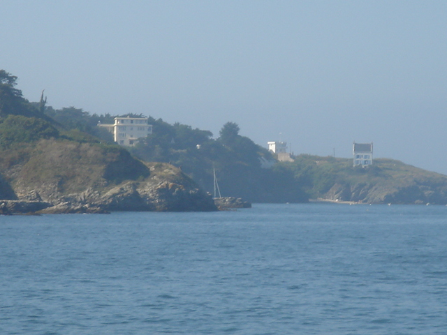 Ancienne villa du baron de l'Espée sur la côte au nord de Le Palais (56), actuellement colonie de vacances de la SNCF.